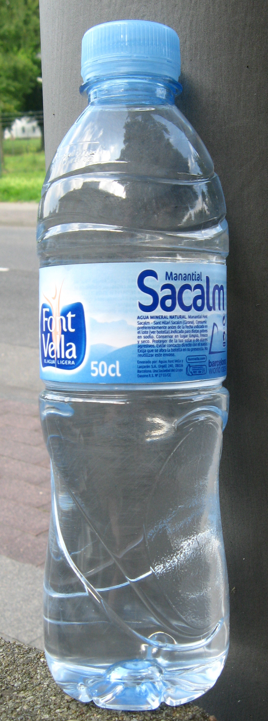 Agua Mineral Font Vella (Mineralwasser Font Vella aus Sant Hilari Sacalm (Katalonien/Spanien)) Datum: 26.06.2011 Urheber: M. Pfeiffer alias Gordito:1869 Quelle: privates Fotoarchiv des Urhebers